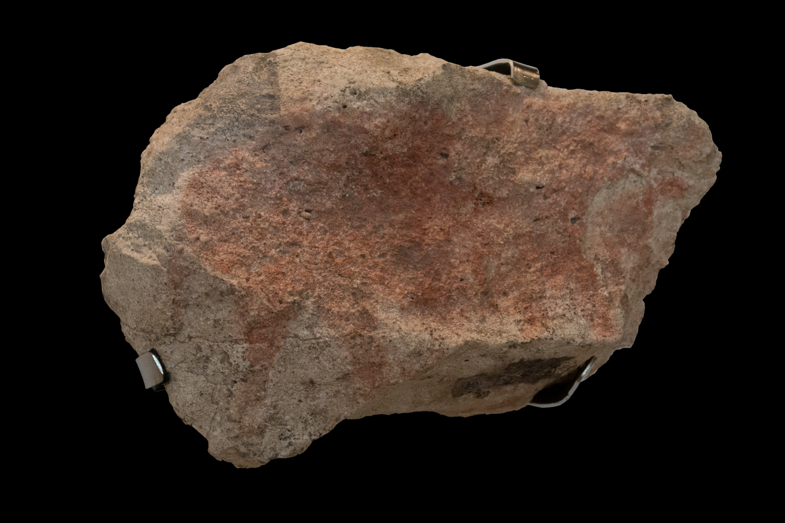 Mit Ocker bemalte Kalksteinplatte aus dem Abri Dalmeri (Riparo Dalmeri) bei Grigno im Trentino, Italien. Ausgestellt im MUSE, Museo delle Scienze in Trento. Maße: 12,1 x 7,5 x 3,8 cm, Gewicht: 358 g, Motiv: Rind, Artefaktnr.: RD 116 (Quelle: Preistori Alpina Vol. 45 (2011), Riparo Dalmeri: Le pietre dipinte dell'area rituale, Seite 80, 94, 95)